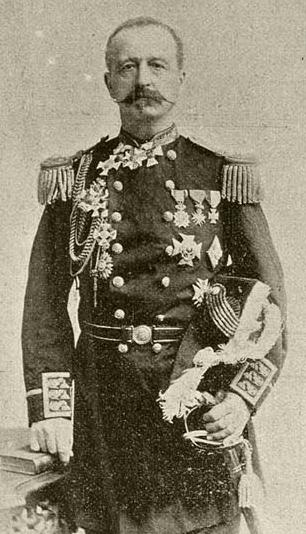 Jhr. J.A. Röell (1838-1924); Nederlands politicus